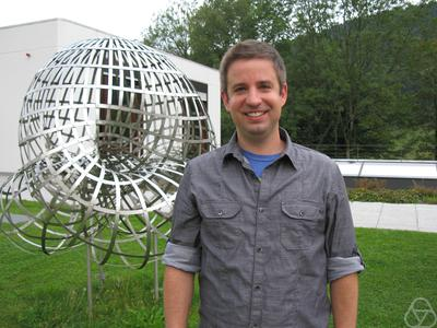 Foto di Roman Holowinsky